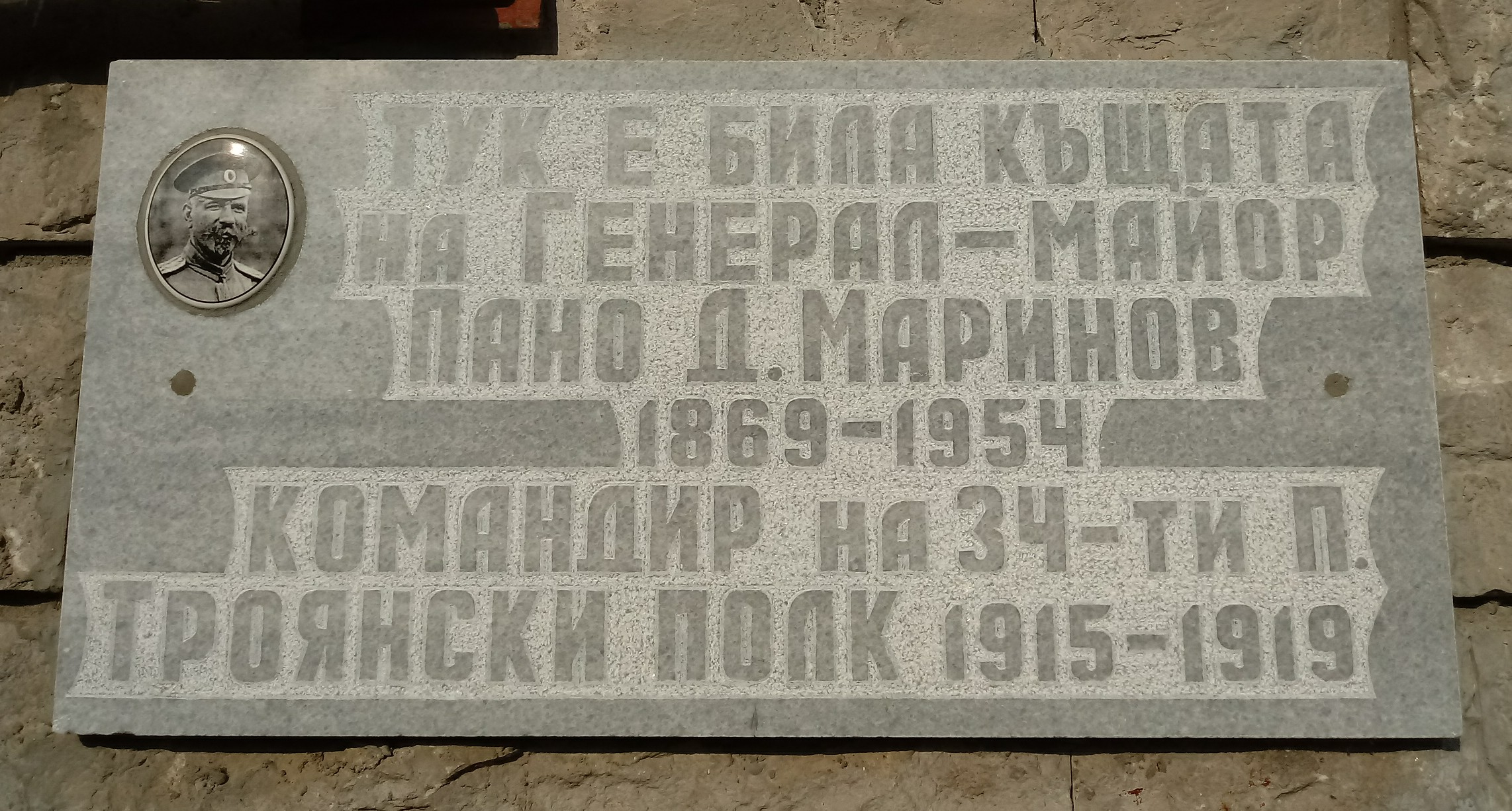 Pano Marinov memorial plaque, Lovech